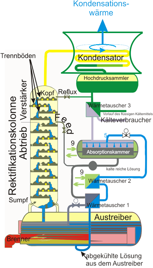 Absorptionskaelteanlage